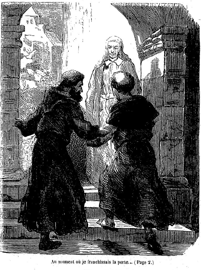 Illustrations de Tony Johannot et Maurice Sand pour le roman "Spiridion" de George Sand, dans sa réédition incluse dans les "Œuvres illustrées de George Sand" parues à Paris chez Hetzel, volume 9, 1856. Illustration figurant en page 9. (Attention : dans les volumes des "Œuvres illustrées de George Sand", la pagination recommence à 1 au début de chaque texte inclus dans un volume.)